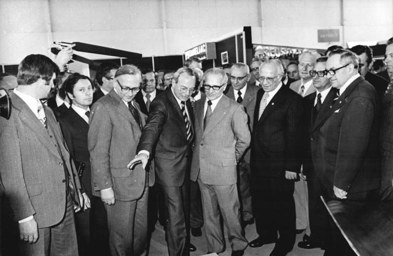 ADN-ZB Link 12.3.1978 Leipzig: Frühjahrsmesse 78 - Rundgang Am Stand der BRD-Firma Thyssen-AG wurden Erich Honecker und die weiteren Mitglieder der Partei- und Staatsführung vom Vorstandsvorsitzenden Dr. Dieter Spethmann (Mitte) über das Messeangebot dieses Unternehmens informiert. Zugegen war dabei auch der Leiter der Ständigen Vertretung der BRD in der DDR, Günter Gaus (2.v.l.).